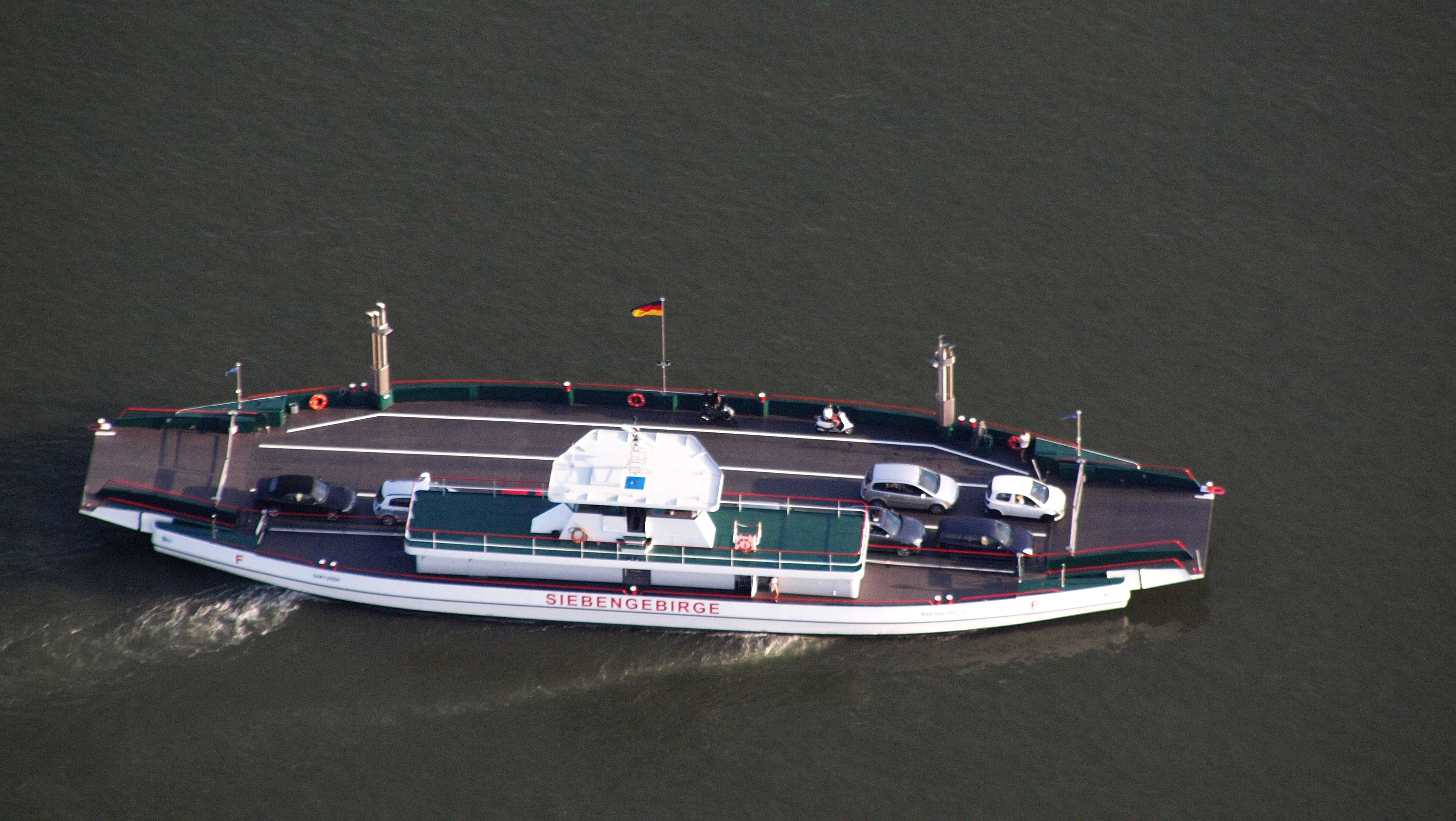 Siebengebirge (Schiff, 2015), Luftaufnahme (2015)